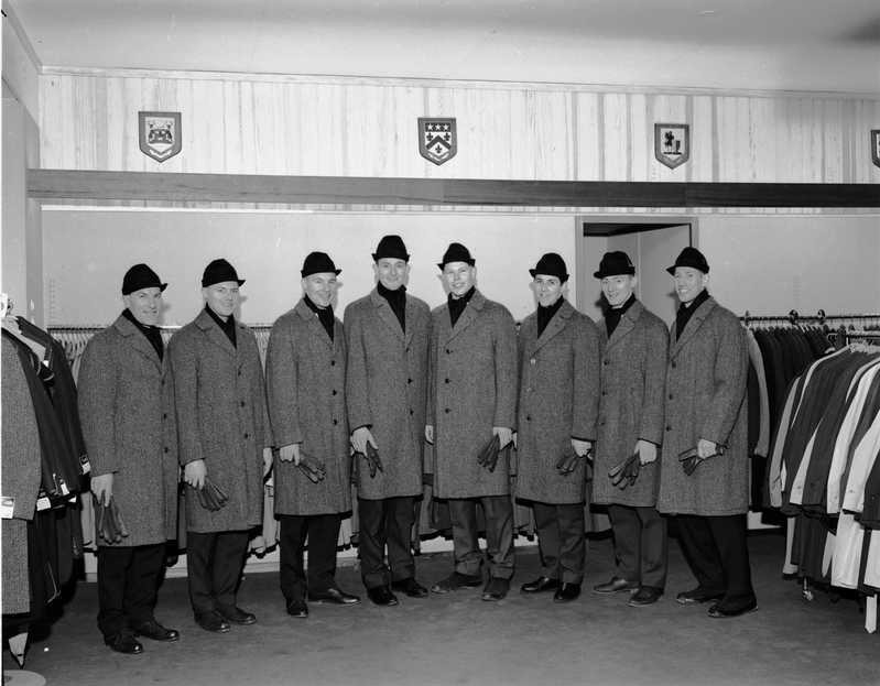 interiør, Herman Mehren herreekvipering, gruppe, menn8, Norges tropp til Verdensmesterskapet på skøyter, offisielt antrekk, frakker, hatter.